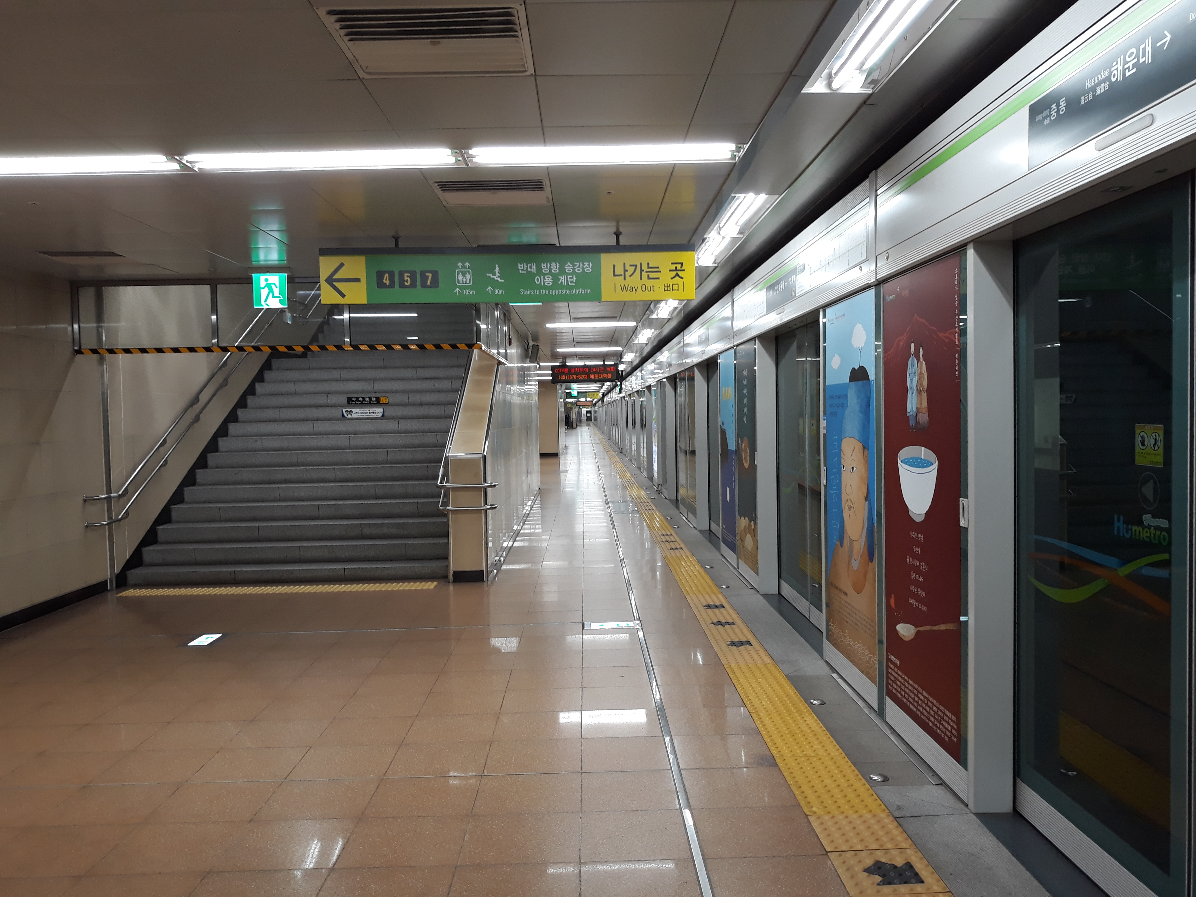 부산 도시철도 2호선 해운대역 양산 방면 승강장